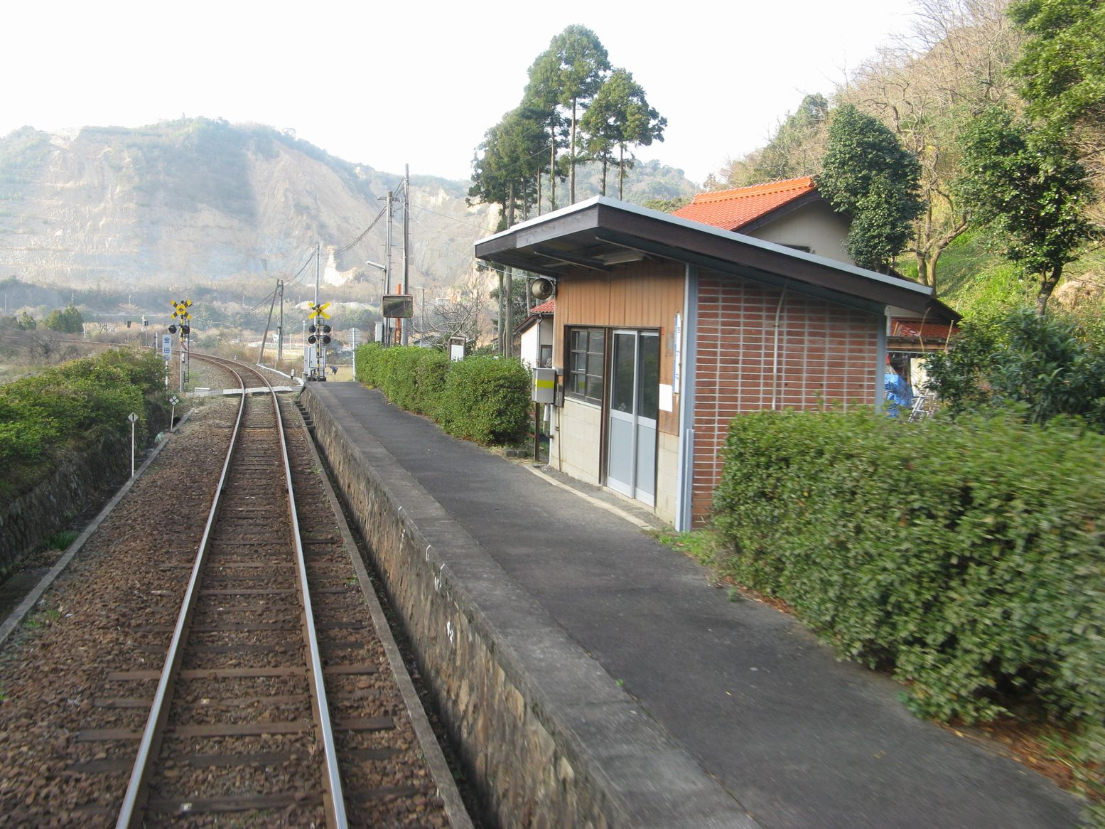 千金駅ホーム 2008年1月9日 Bakkai撮影